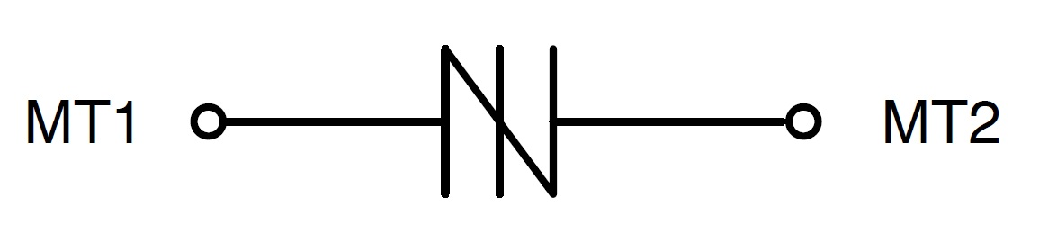 símbolo para el SIDAC